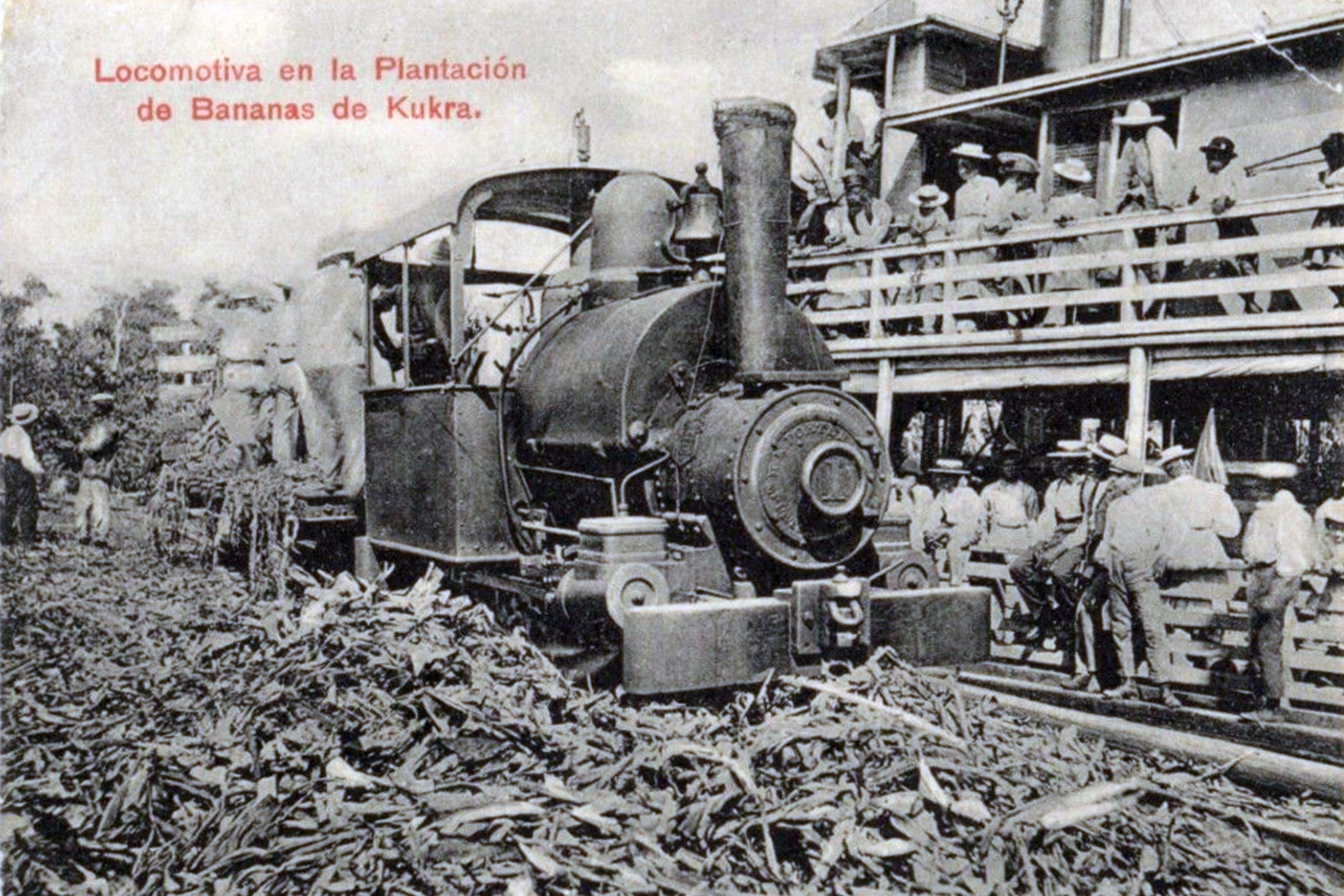 Porter saddle tank, Kukra River, Nicaragua, circa 1909